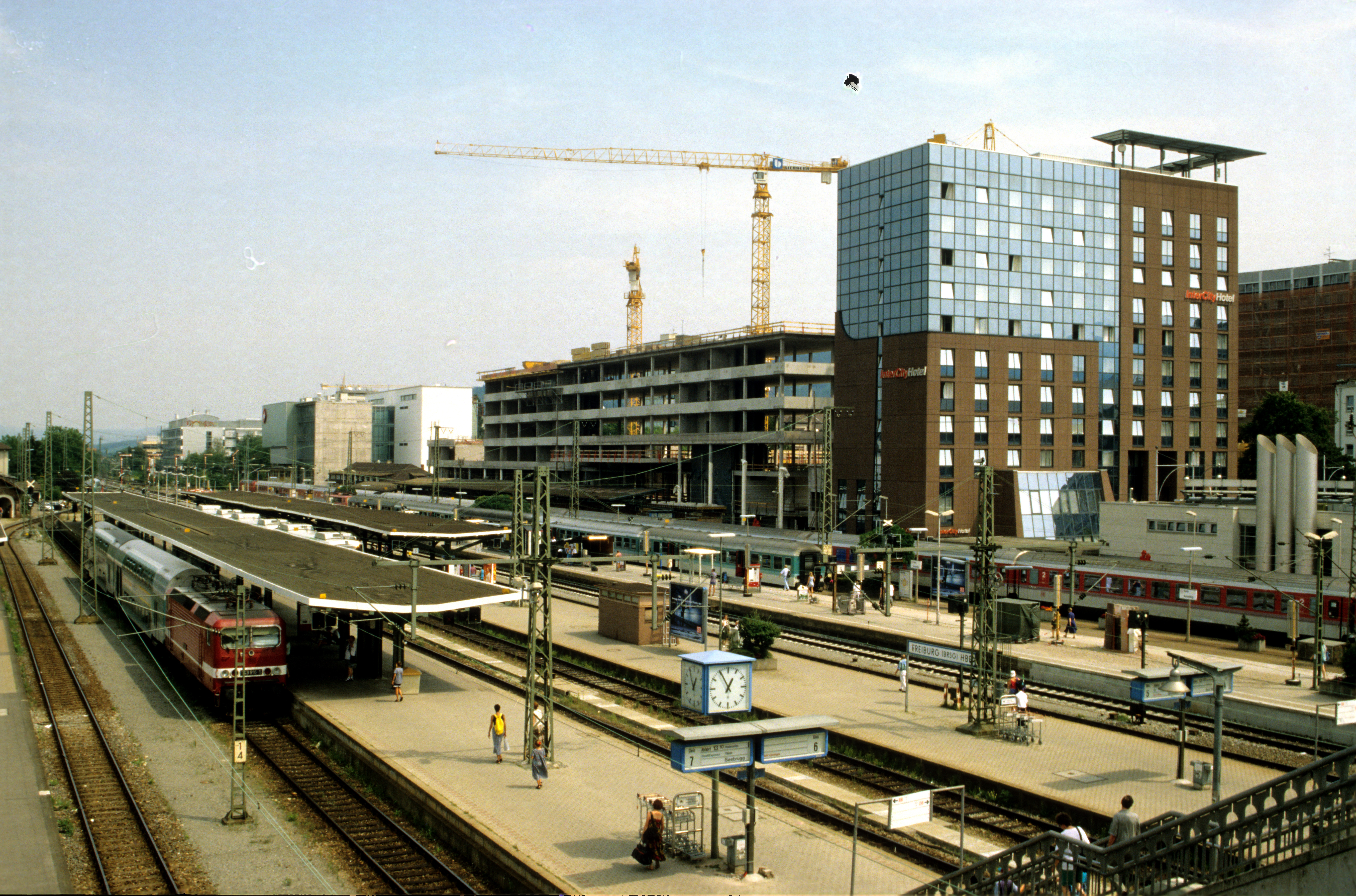 Erster Bauabschnitt des Neubaus Hauptbahnhof Errichtung des Empfanggebäudes. Auf Bahnsteig Gleis 2/3 besteht bereits die neue ICE-Überdachung.